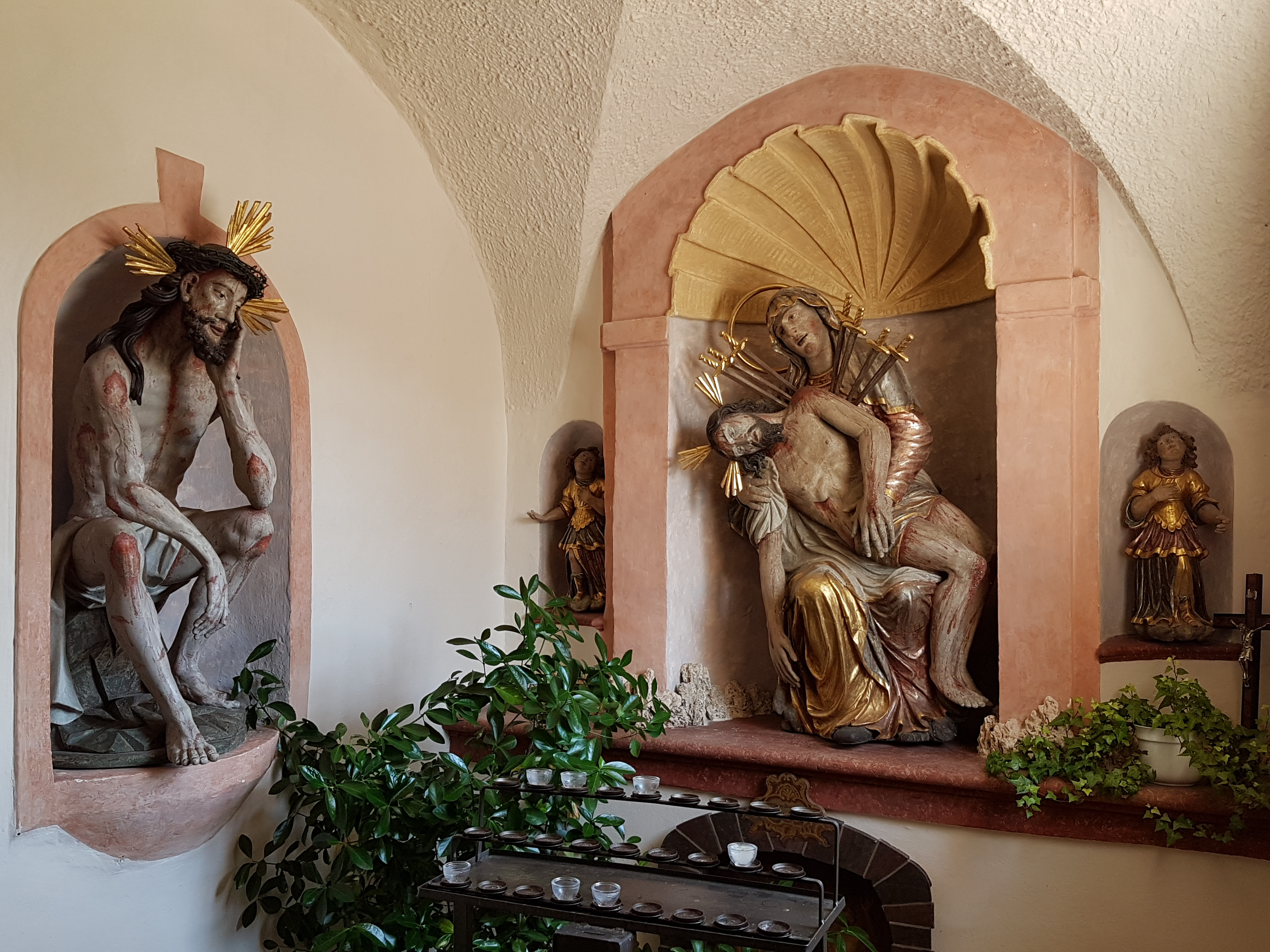 Prem, Kirche St. Michael